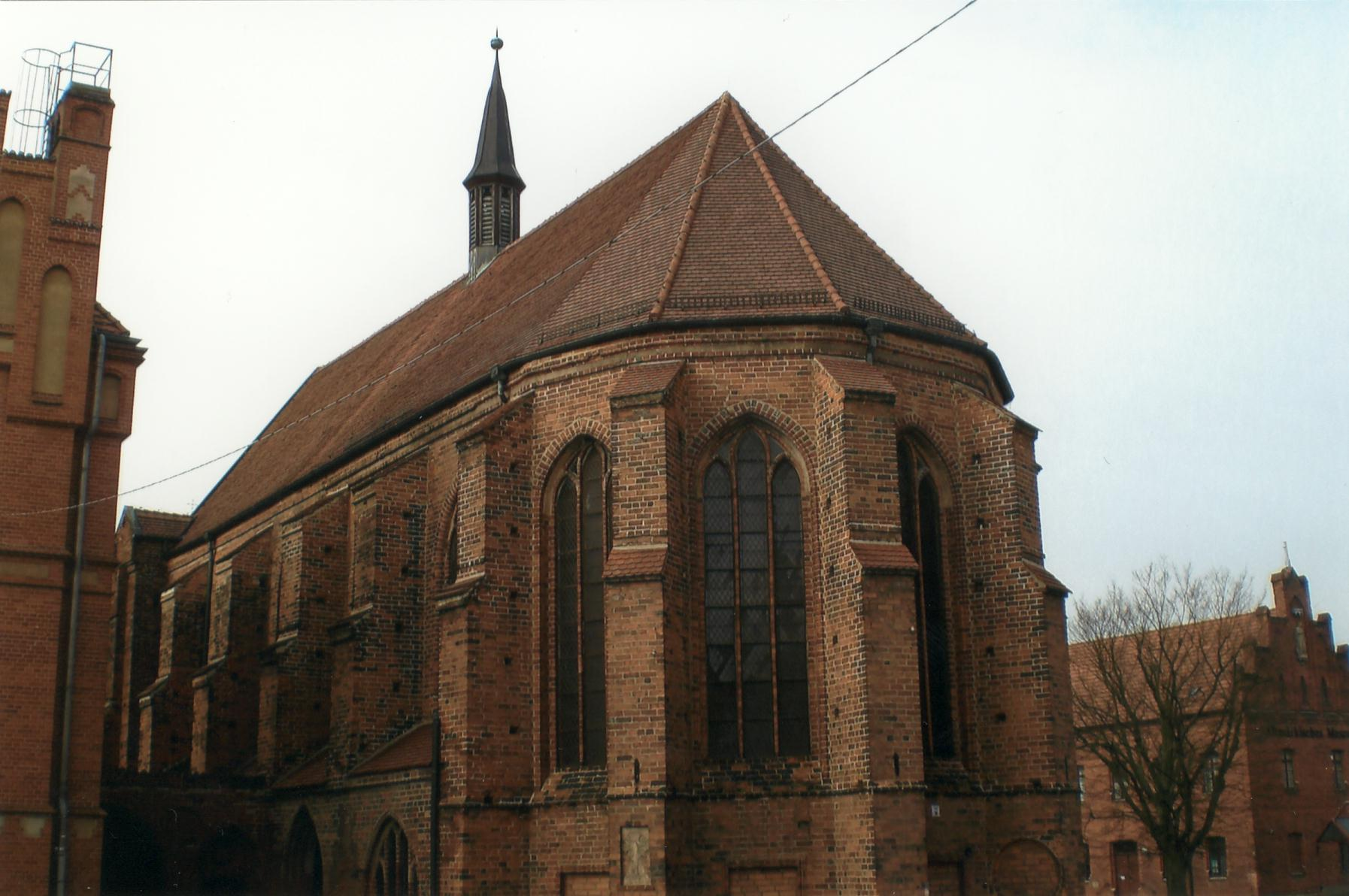 Katharinenkirche Stendal/ rechts Altmärkisches Museum